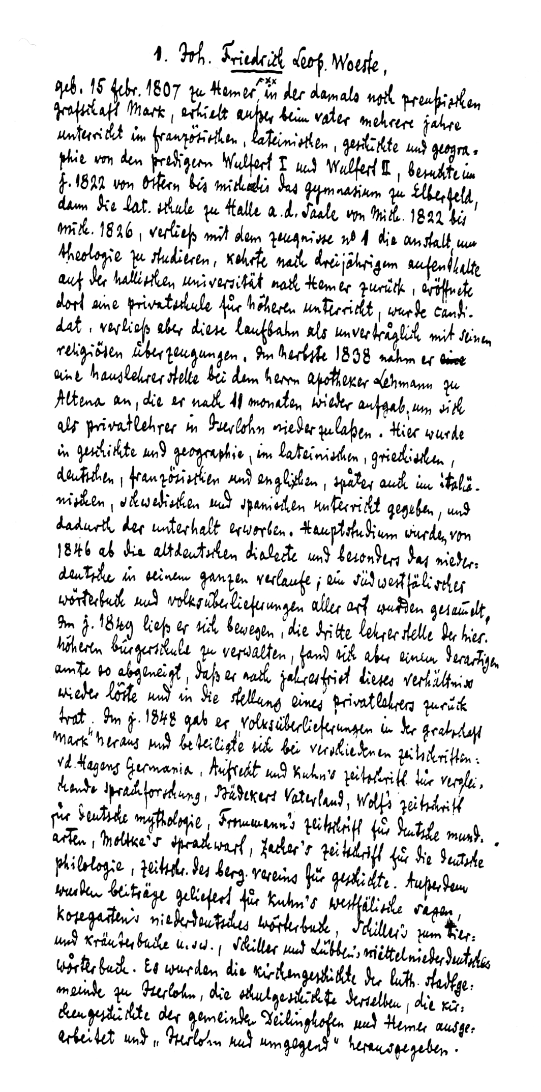 Handschrift "Woeste über sich selbst" aus der von Friedrich Woeste selbst angelegten Familienchronik.